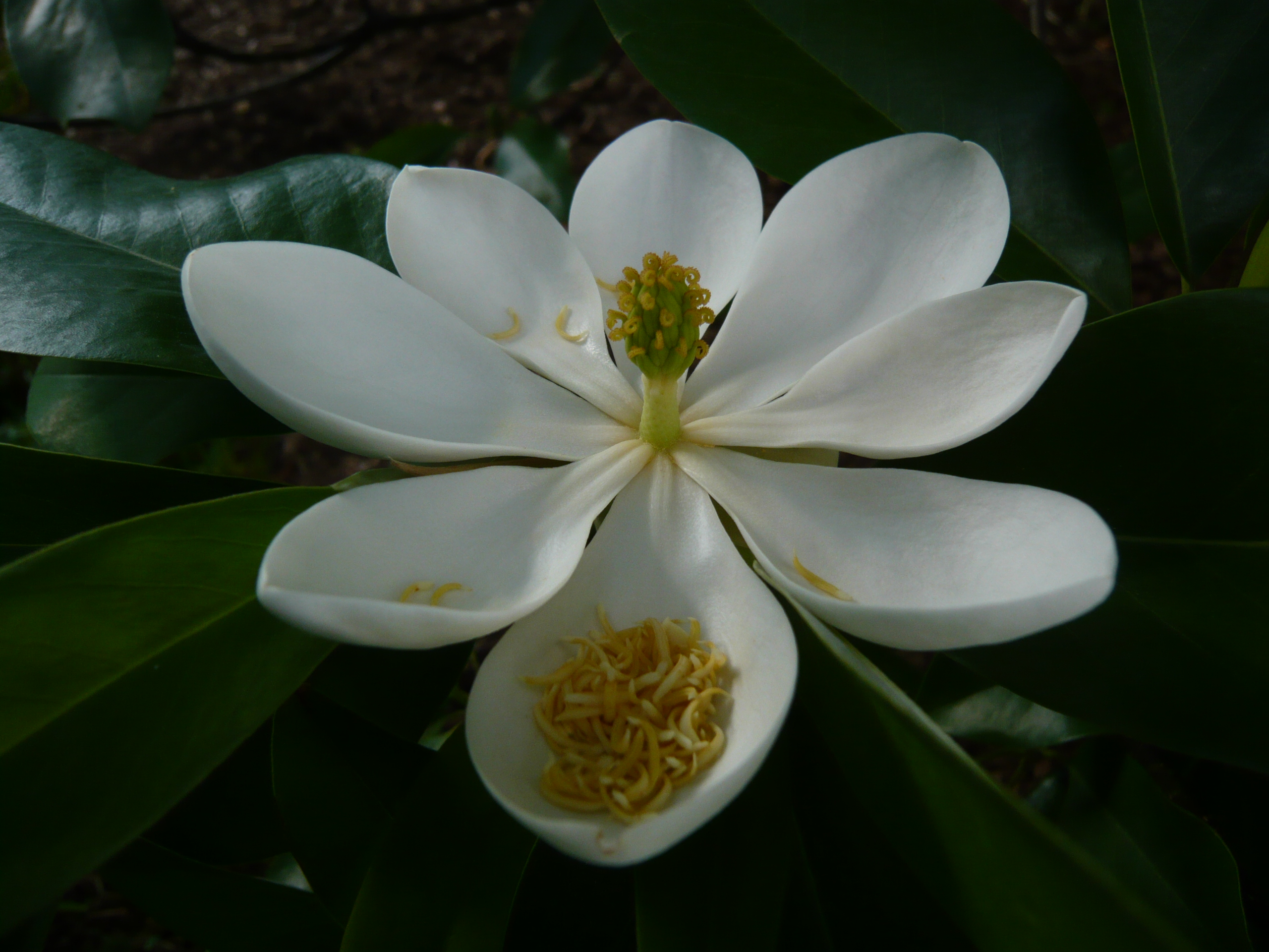 Flor de magnòlia (Boston, USA)